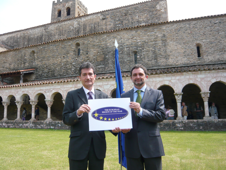 Proclamació oficial dels Pirineus com a Regió Europea de l'Any 2012. A l'esquerra, M. Xavier Tudela, president de l'Organització de la Regió Europea de l'Any. A la dreta M. Josep Adolf Estrader, secretari general de la TSF Network, entitat promotora dels "Pirineus Sense Fronteres, Regió Europea de l'Any 2012". L'indret triat per a la proclamació és el monestir de Sant Miquel de Cuixà, a la falda del Canigó.